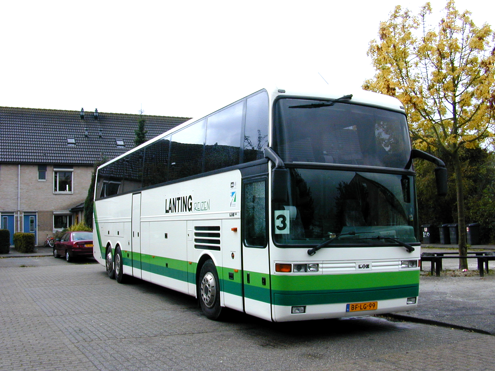 Lanting Reisen bus van het type EOS 233 te Klazienaveen.